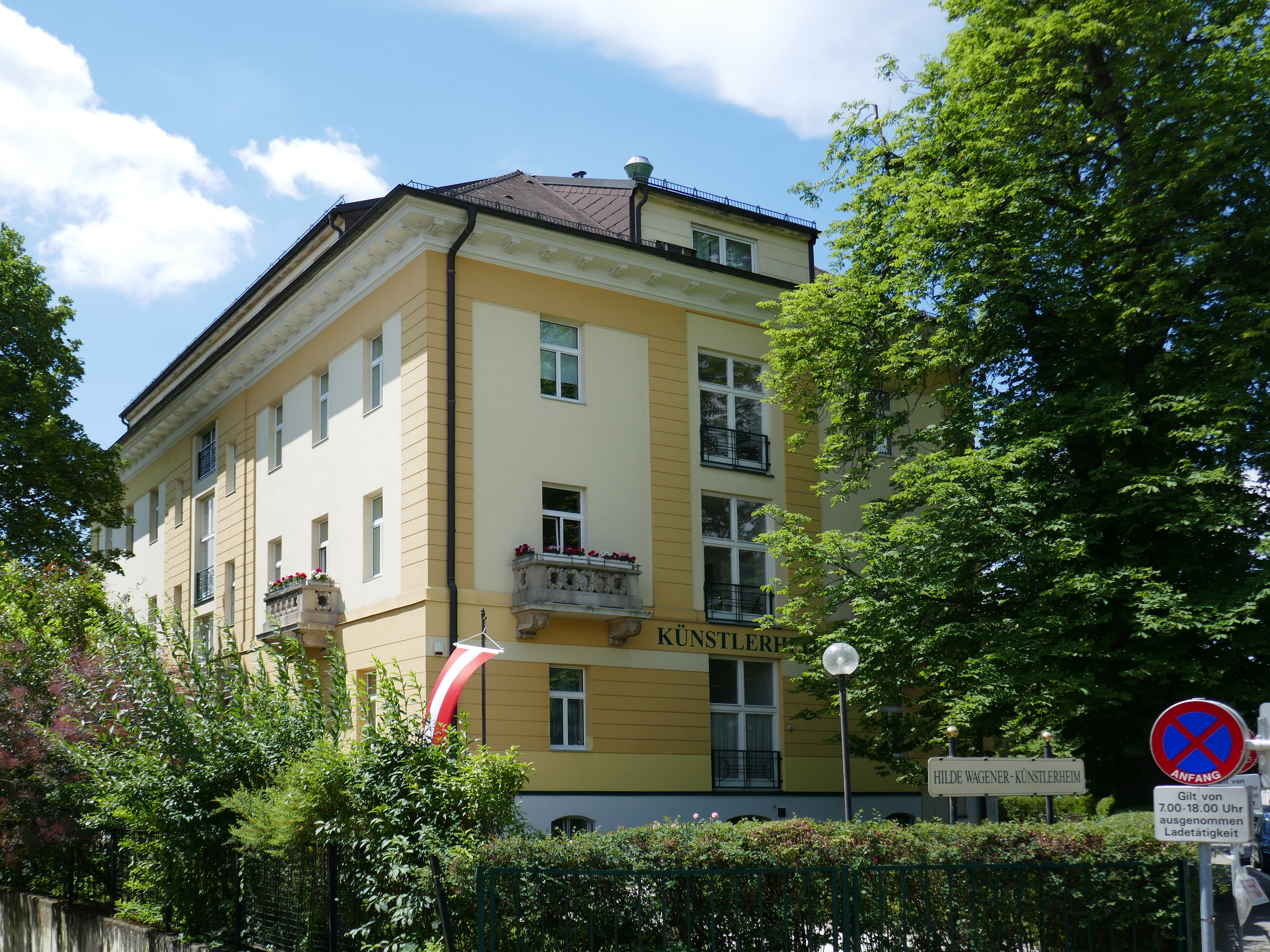 Hilde Wagener-Künstlerheim (Weilburgstraße 13A) in Baden bei Wien.